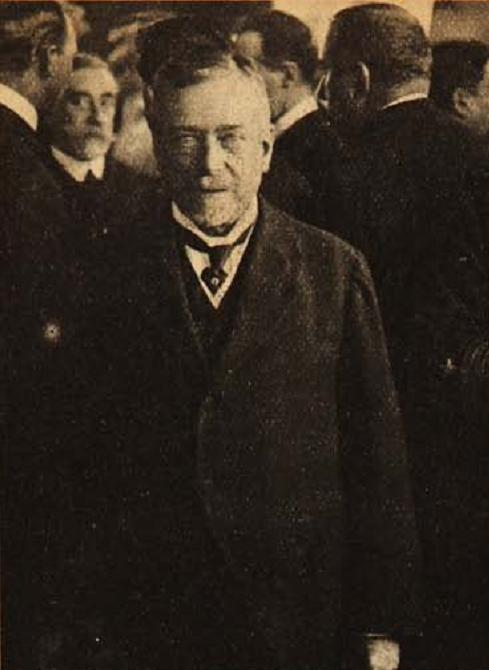 El Almirante Goñi durante su retiro de la Armada. Luis Anacleto Castillo Goñi nació en Santiago el 12 de agosto de 1844 y falleció el 9 de noviembre de 1928. Fue un marino chileno que alcanzó el grado de vicealmirante.